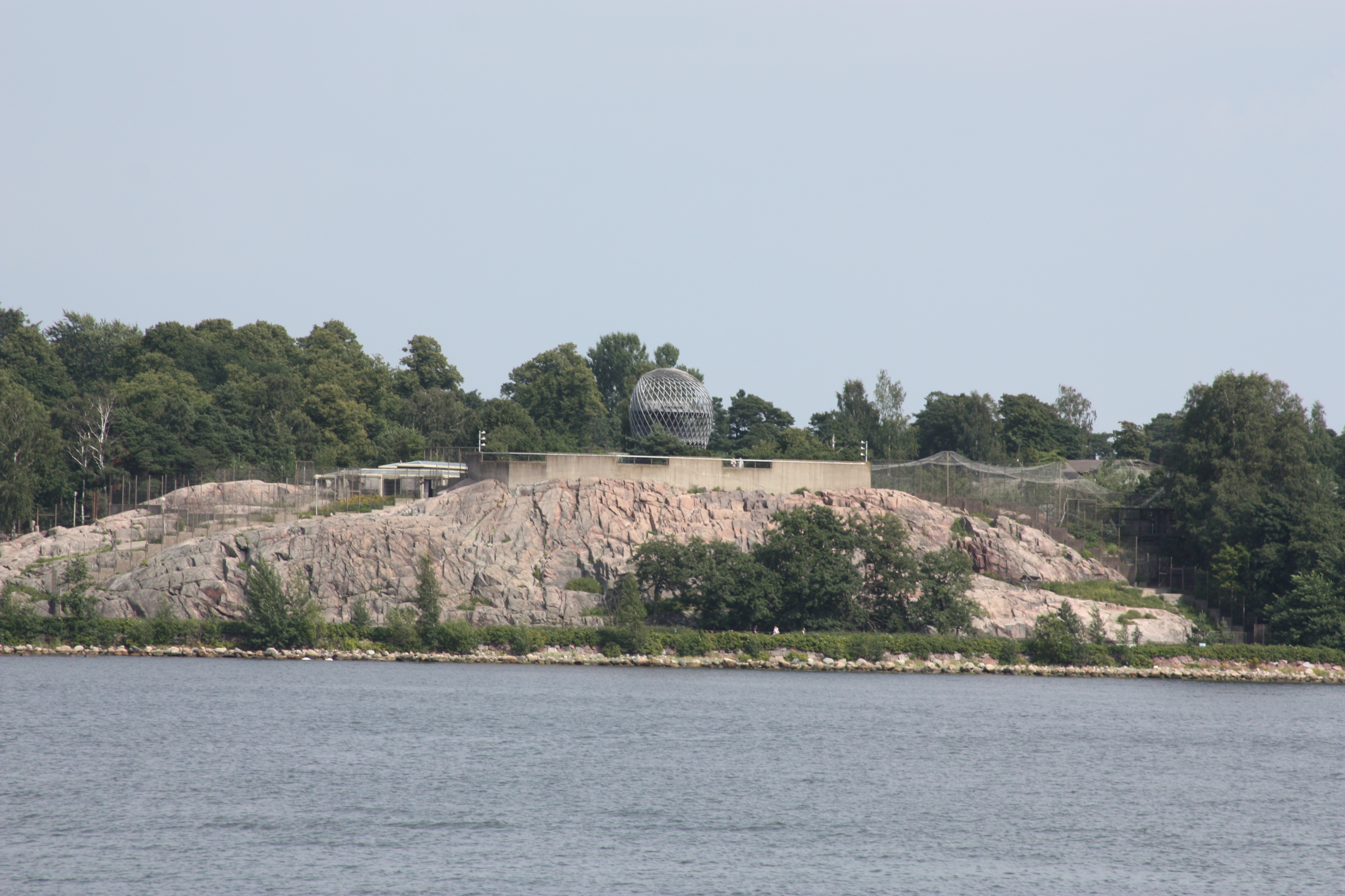 tourist pictures of Helsinki